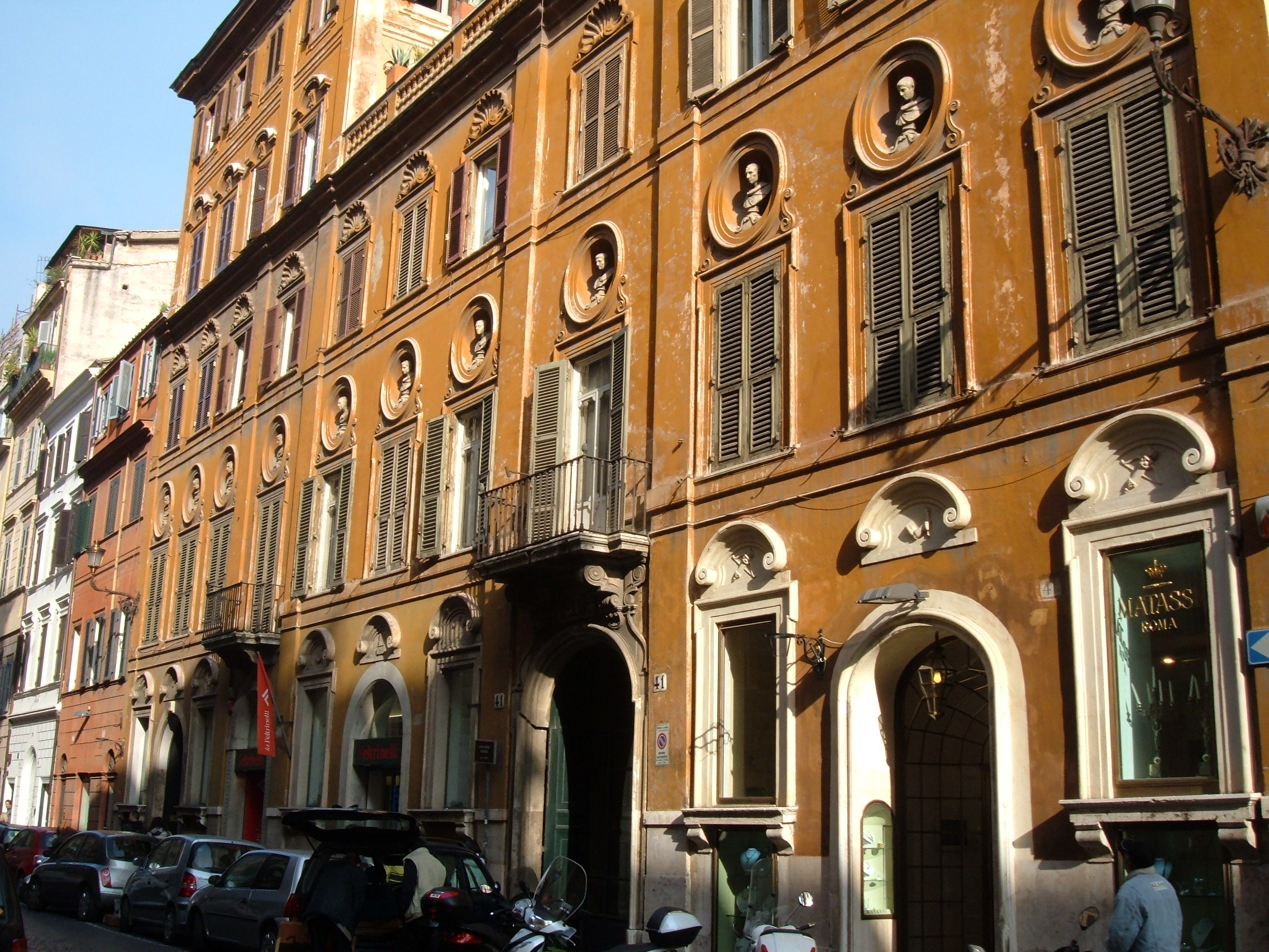 Palazzo Sterbini, a Roma, in via del Babuino (rione Campo Marzio).